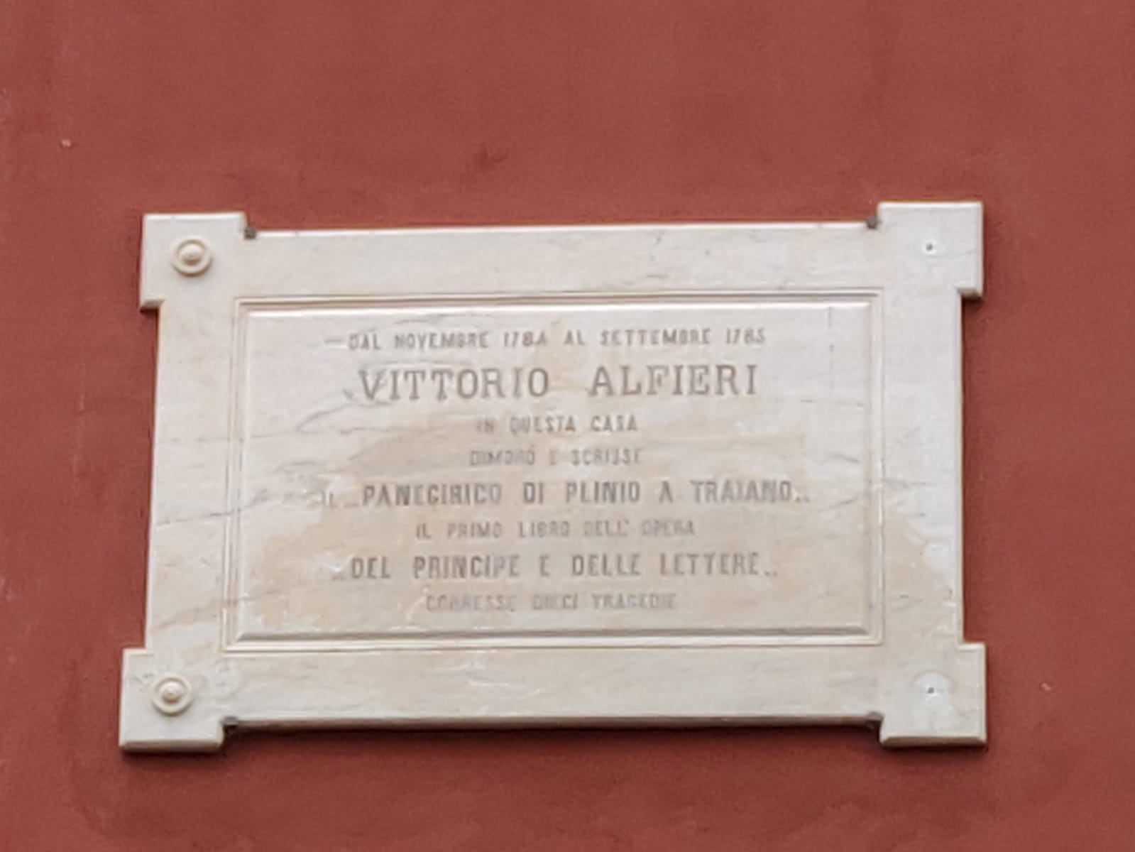 Lapide commemorativa su Palazzo Venera che ricorda il soggiorno di Vittorio Alfieri a Pisa